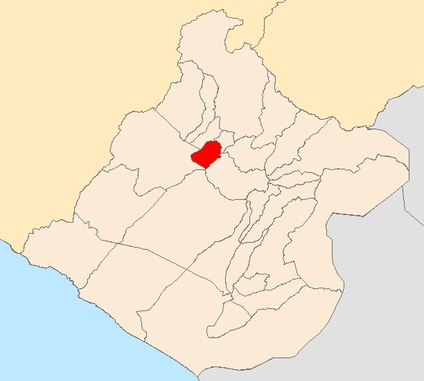 Mapa distrito Curibaya,Tacna - Perú